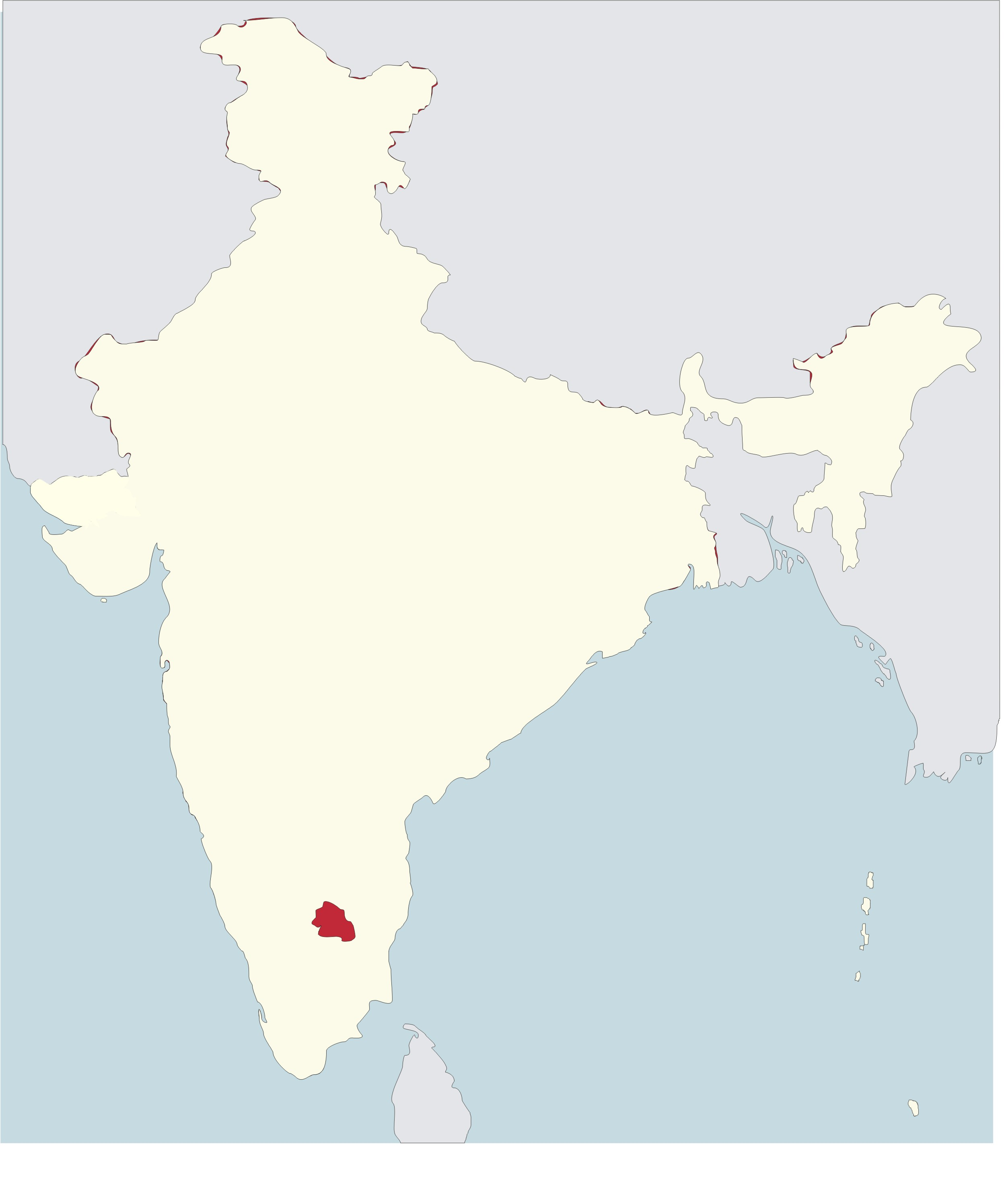 Mapa de la diòcesi de Dharmapuri a l'Índia